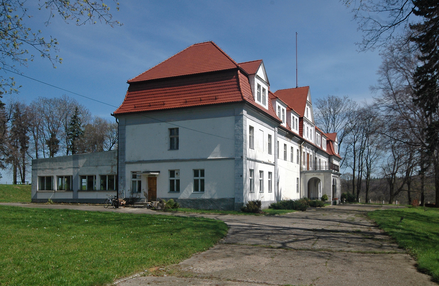 pałac (Piotrkówek), Niemcza, pow. dzierżoniowski